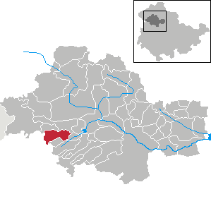 Langula in Thuringia - Unstrut-Hainich-Kreis